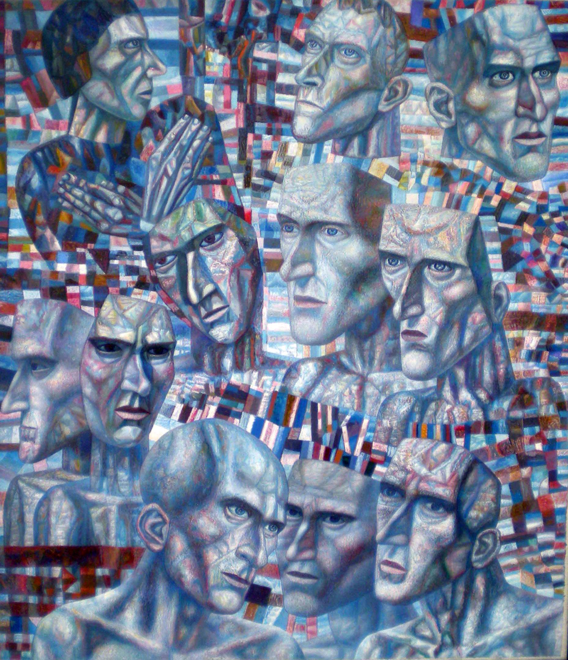 Павел Филонов "Ударники(Мастера аналитического искусства)". 1934 - 1935 гг.